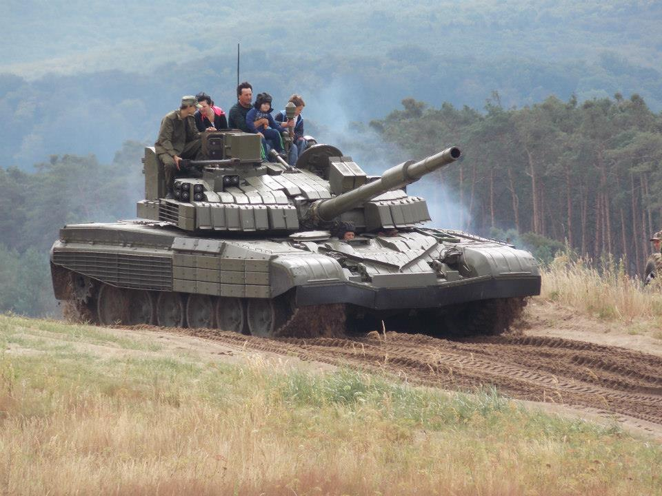 T-72M2 na Slovenských Pieskoch 2013